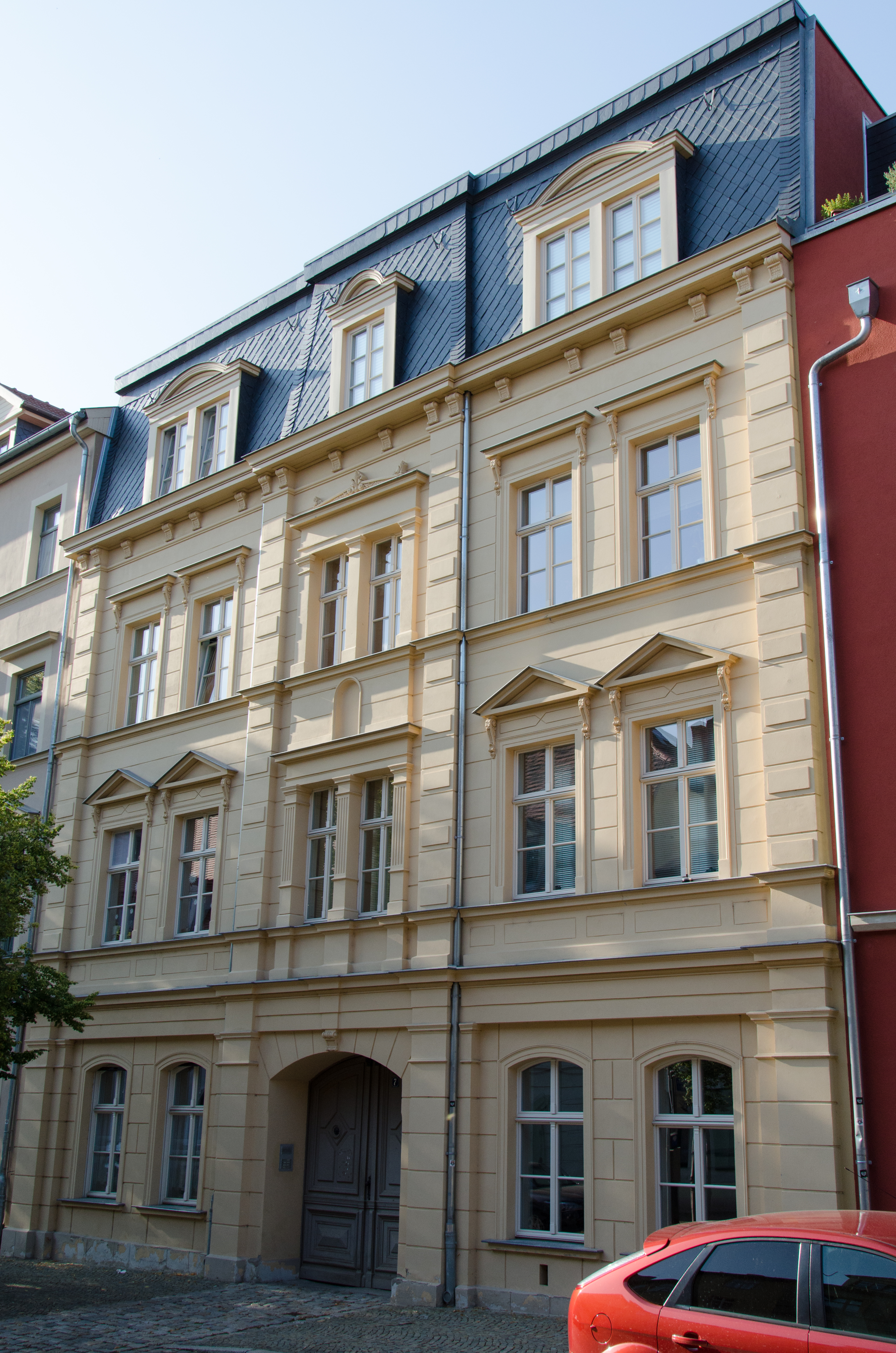 Naumburg, Fischstraße 7